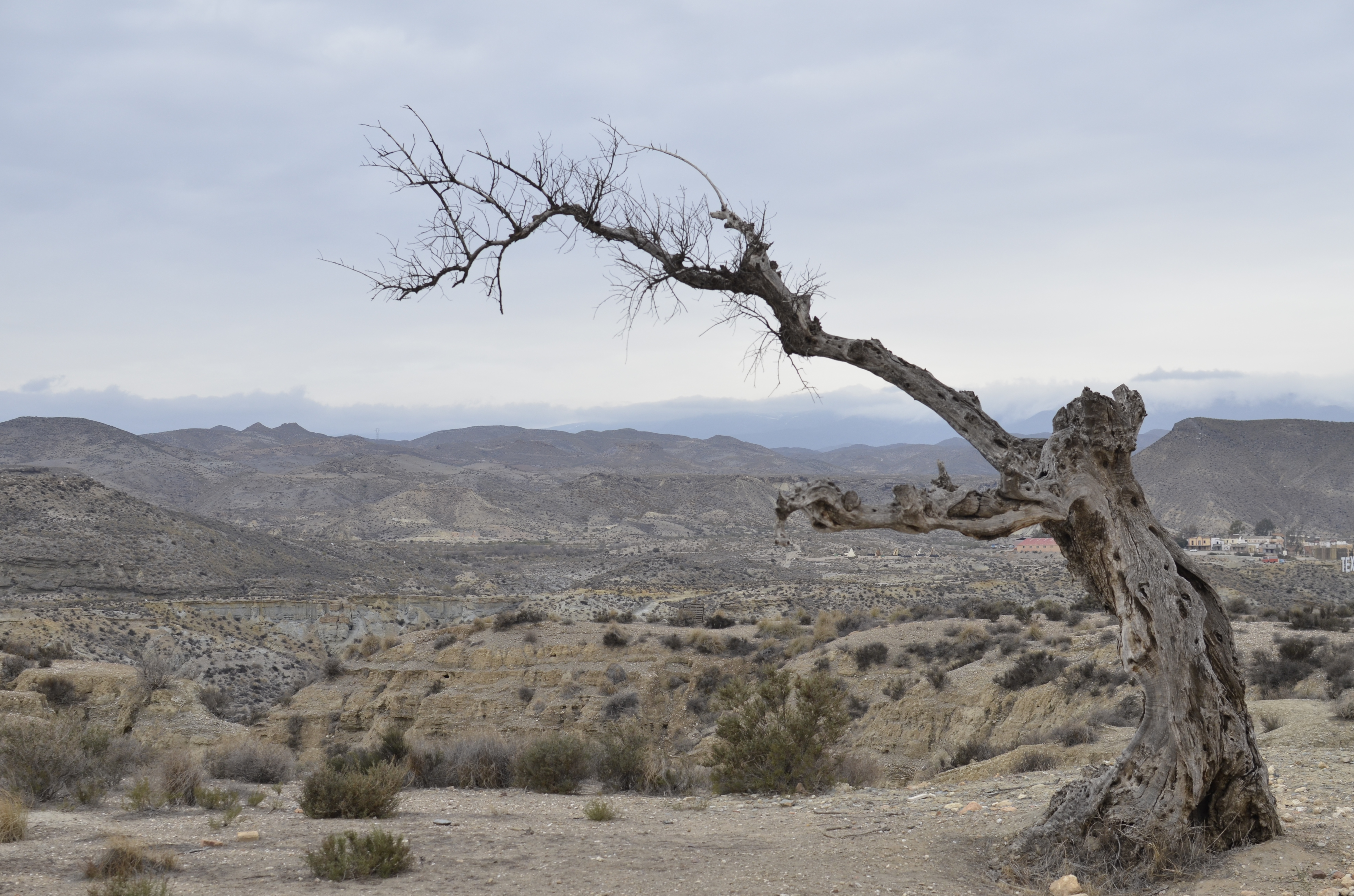 Paraje Natural Desierto de Tabernas This is a photography of a Site of Community Importance in Spain with the ID: ES0000047. Natura2000 entry, EEA entry